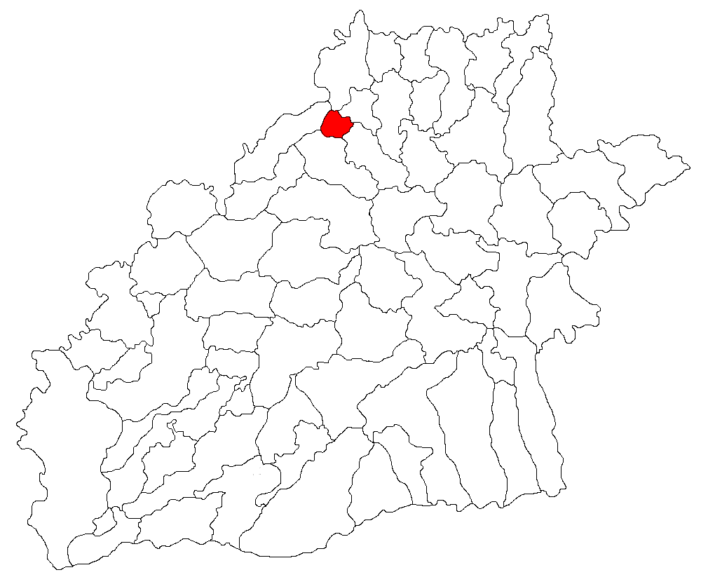 Categorie:Hărţi ale judeţului Sibiu Licensing Categorie:Imagini din Transilvania